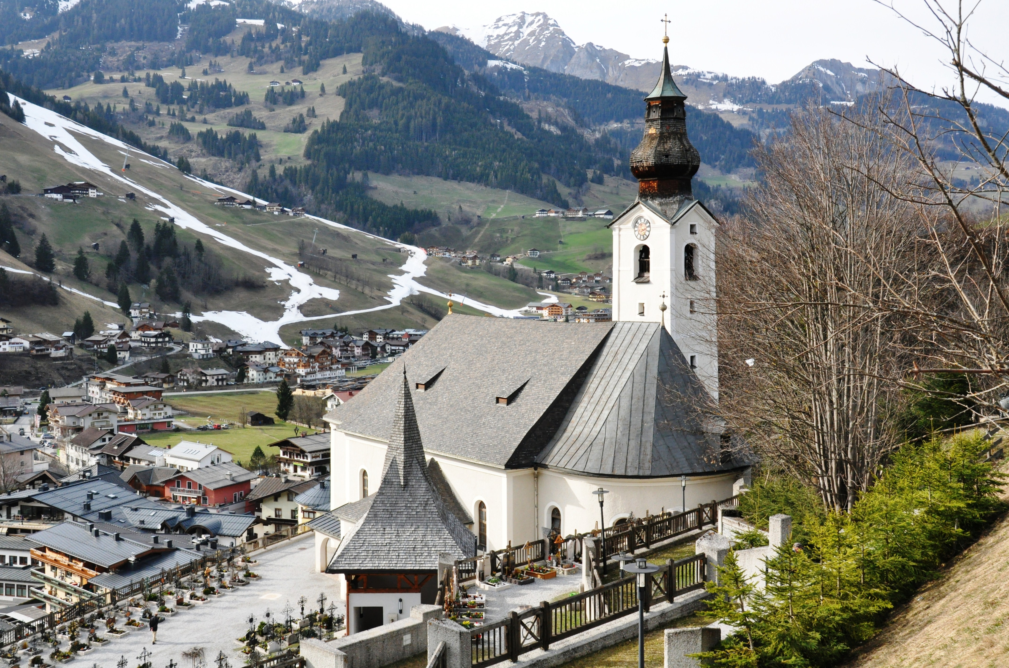 Die Pfarrkirche von Großarl mit einem Blick über das Tal Richtung Westen